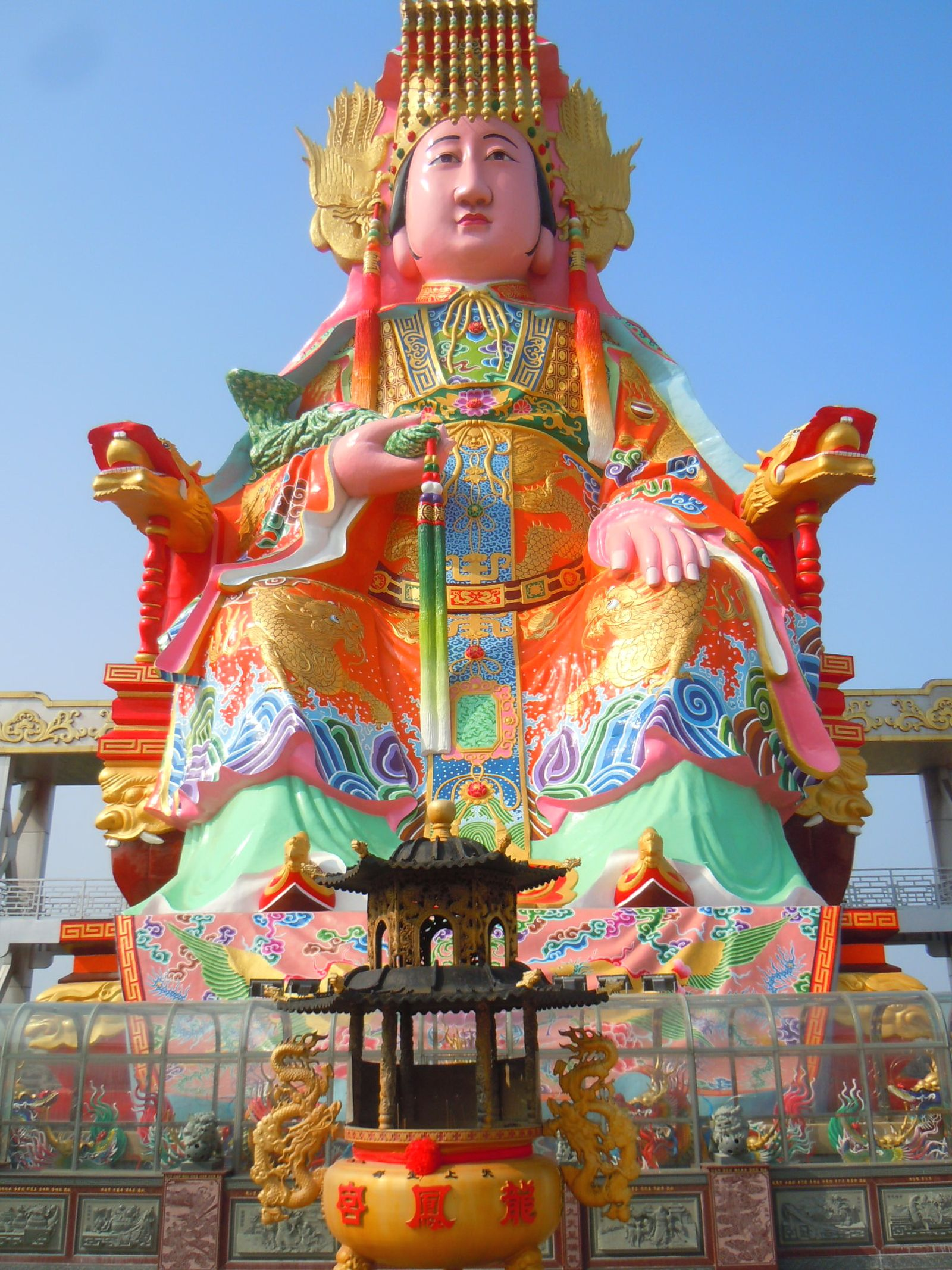 竹南后厝龍鳳宮廟頂大媽祖塑像。